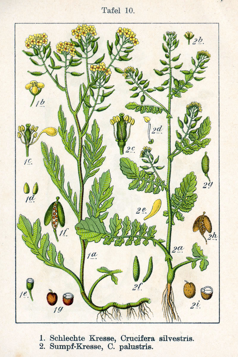 1: Rorippa sylvestris subsp. sylvestris, syn. Crucifera sylvestris (L.) E.H.L.Krause2: Rorippa palustris (L.) Besser, syn. Crucifera palustris (L.) E.H.L.Krause Original Description 1. Schlechte Kresse, Crucifera sylvestris2. Sumpf-Kresse, Crucifera palustris